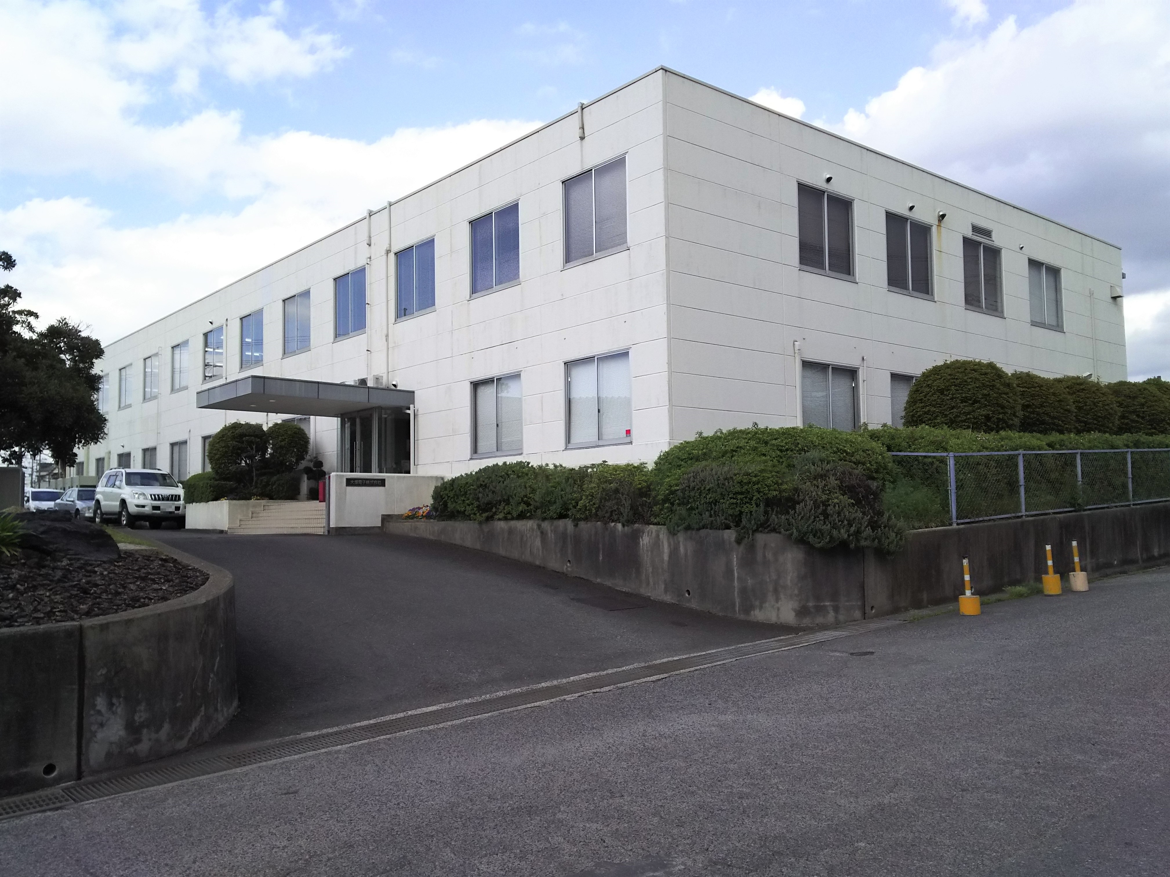 大塚電子本社（大阪府枚方市）